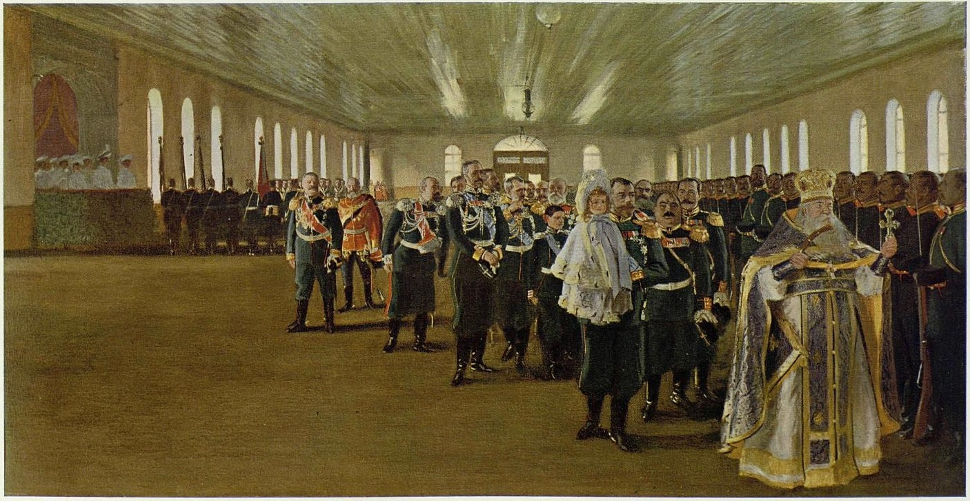 Высочайший парад Л.-Гв. Финляндскому полку 12 декабря 1905 года в Царском селе. С картины художника Кустодиева